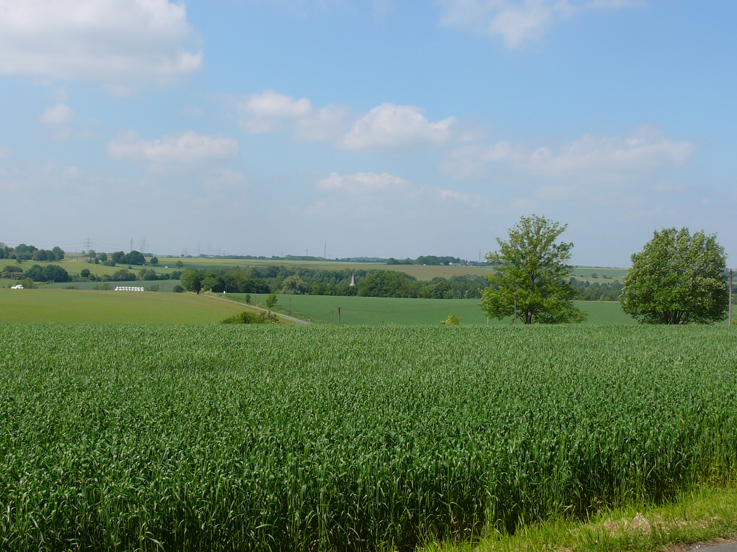 Blick auf Schöller, Wuppertal